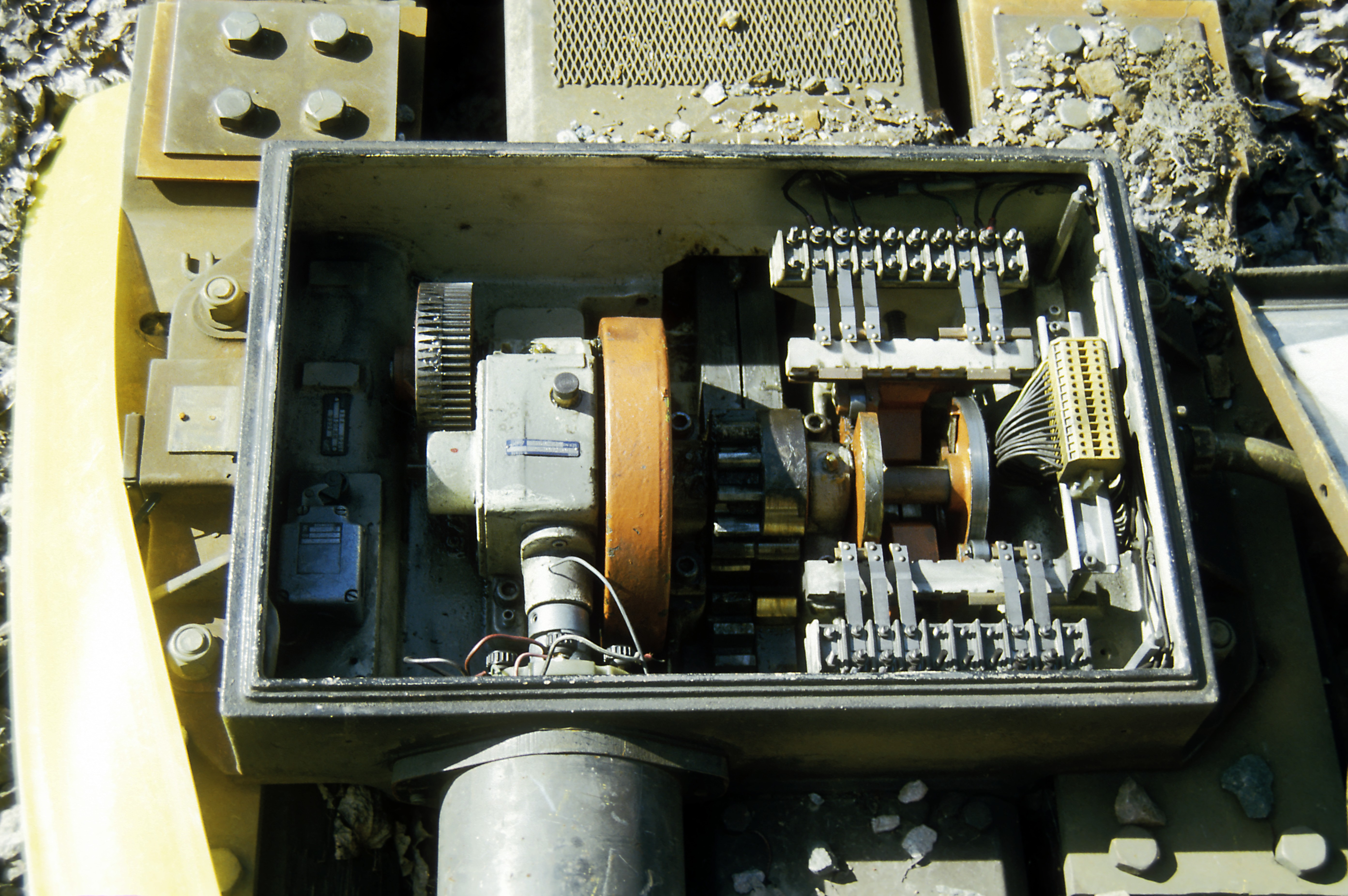 Weichenantrieb mit Innenverschluss. In der Mitte die separaten Zahnstangen für jede Zunge, rechts die Anbtriebskontakte mit den Zungenprüfern.